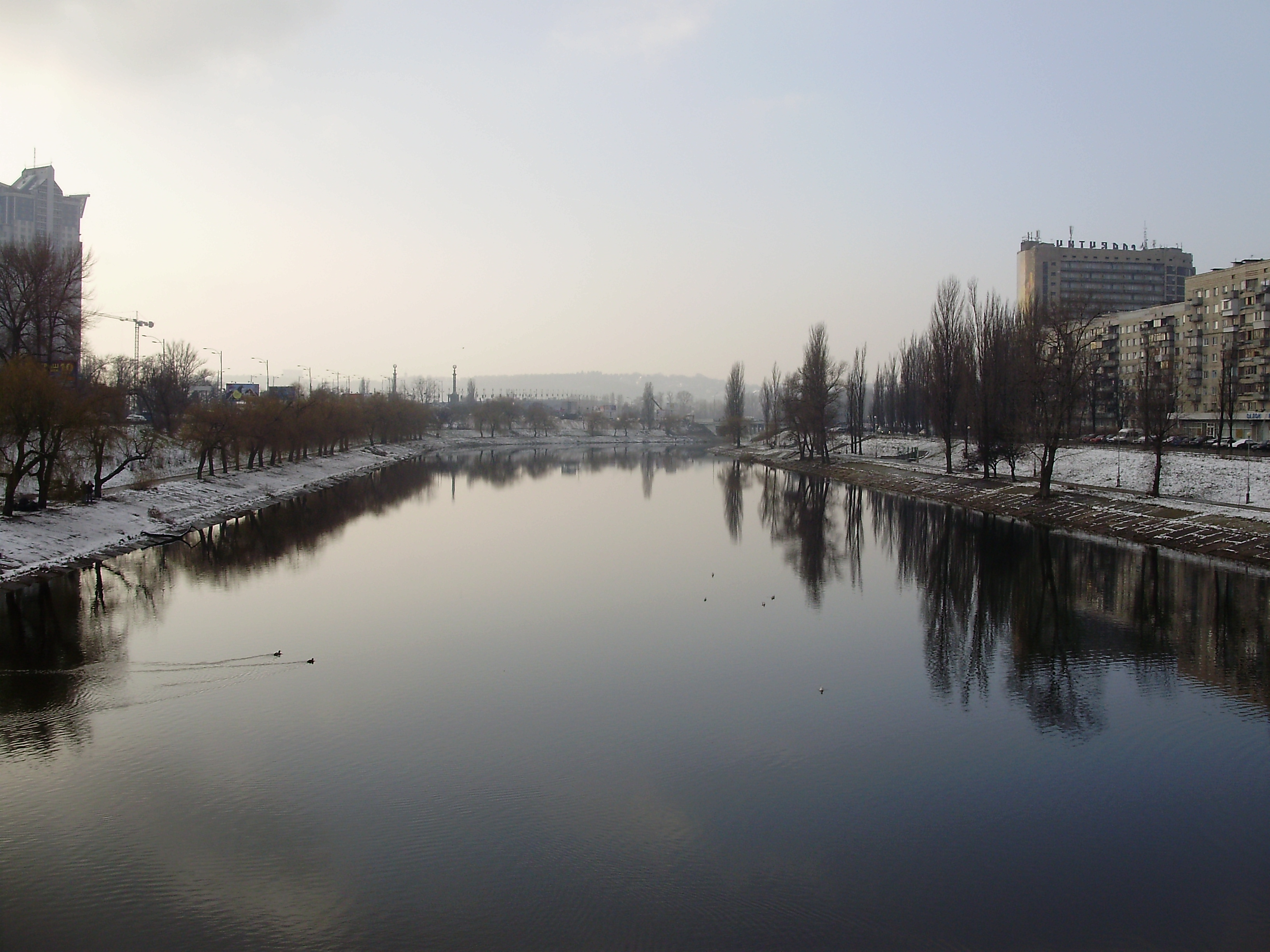 Русанаўскі канал. (Кіеў)